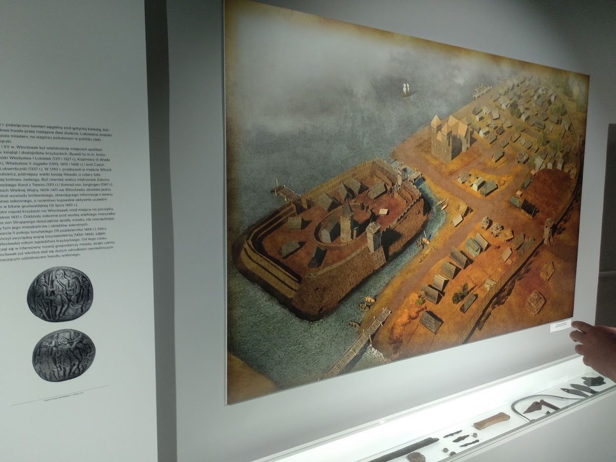 Muzeum Historii Włocławka (2019 r.)